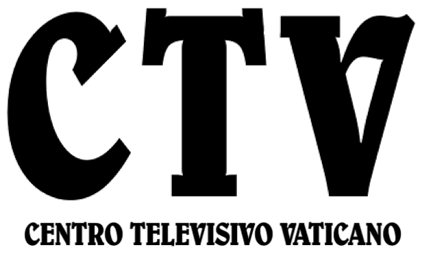 Logo del Centro Televisivo Vaticano in uso dal 22 ottobre 1983 al 28 giugno 2011